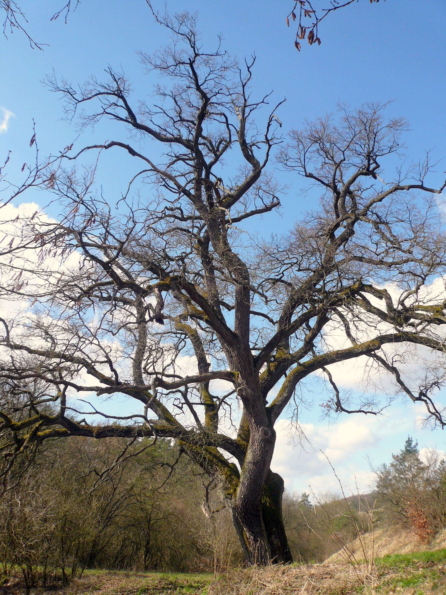 Eiche am Haskenstein bei Ramsthal